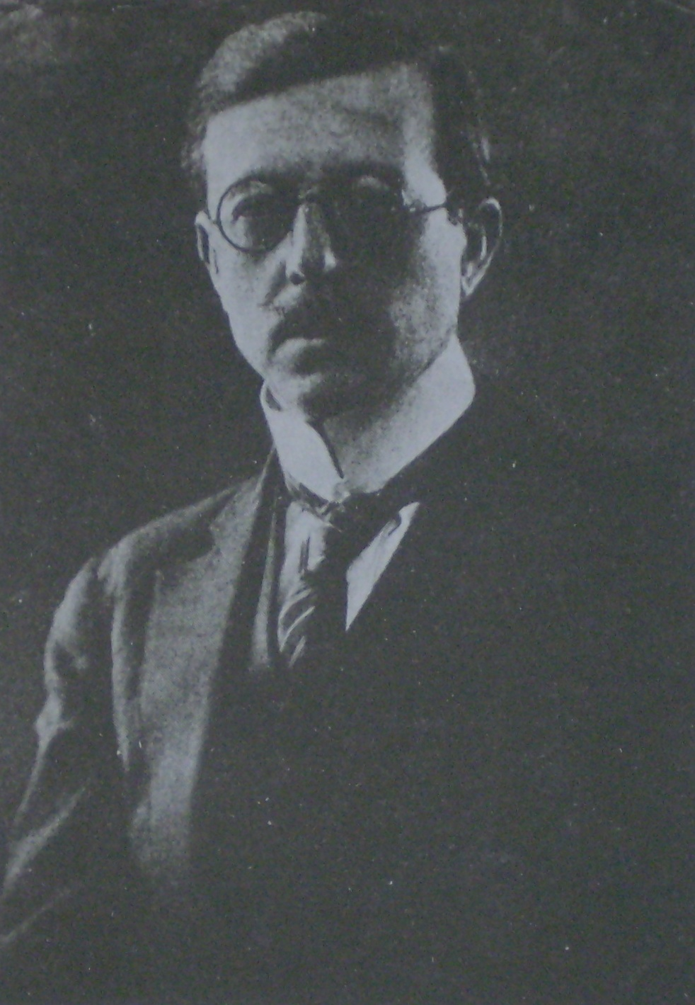 Joaquín Frenguelli (1883—1958)